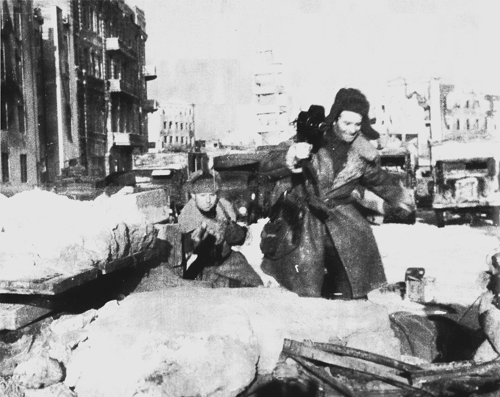 Кинооператор Валентин Иванович Орлянкин (1906—1999) в Сталинграде. 1943 г